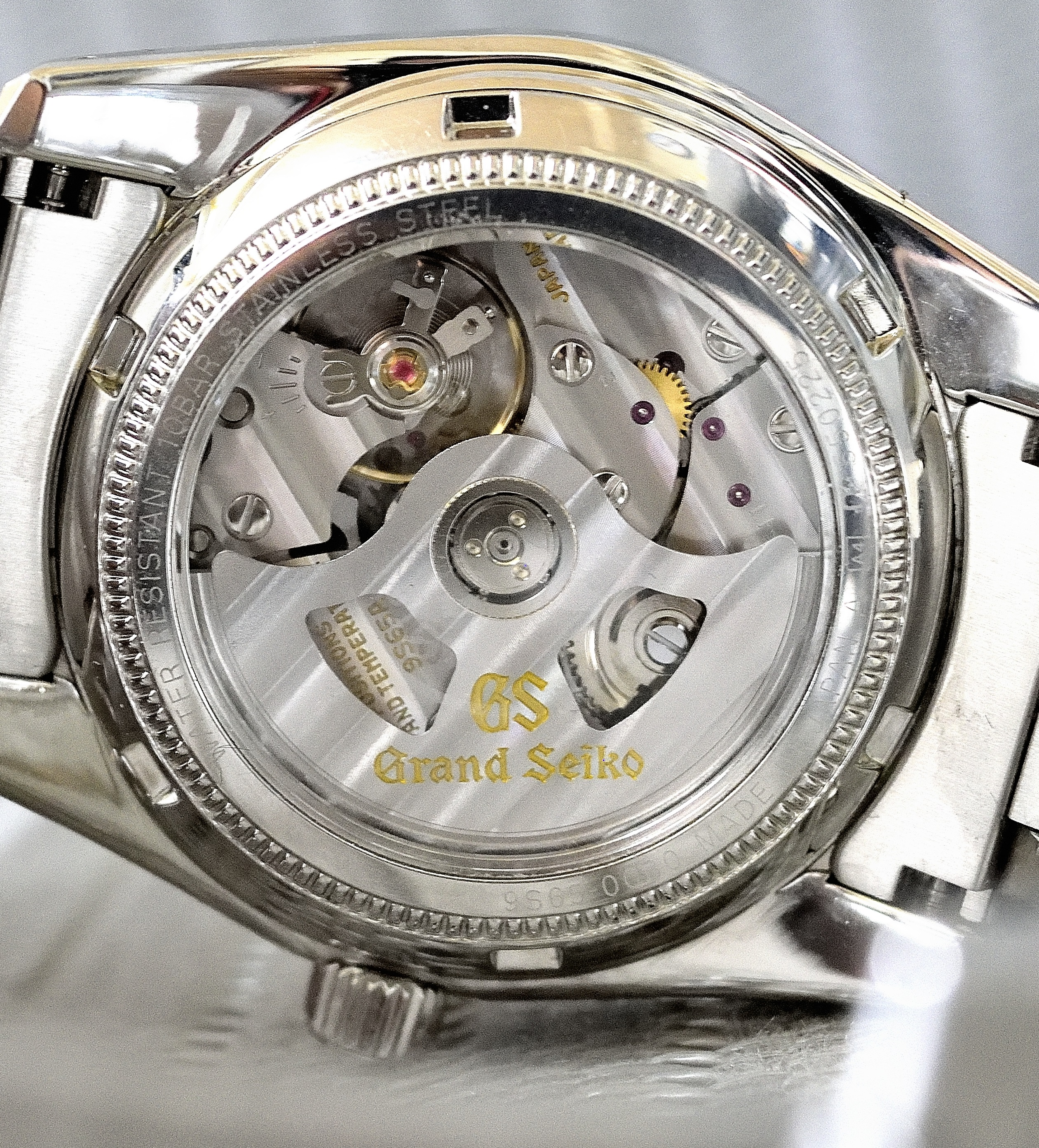 ＳＢＧＲ０５１ ９Ｓ６５ 自動巻ムーブメント